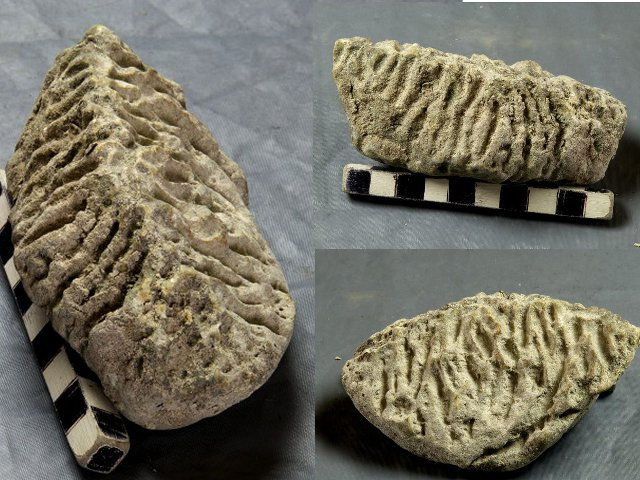 Furchenstein von Chiemsee mit bevorzugt vertikaler Anordnung der Furchen. Die Fundstellen war die Wellenschlagszone (Eulitoral).